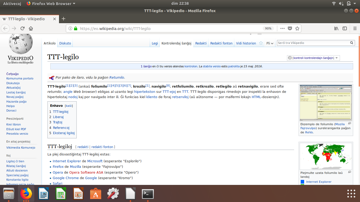 Firefox versio 59 pri Ubuntu-versio 17.10 Artful Aardvark. La Vikipedio paĝo por TTT-legiloj estas malfermita.